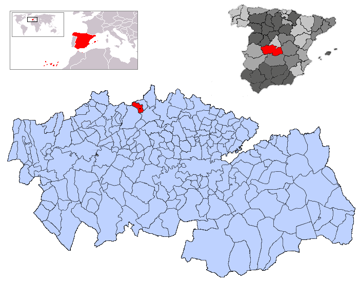 Aldea en Cabo en la provincia de Toledo